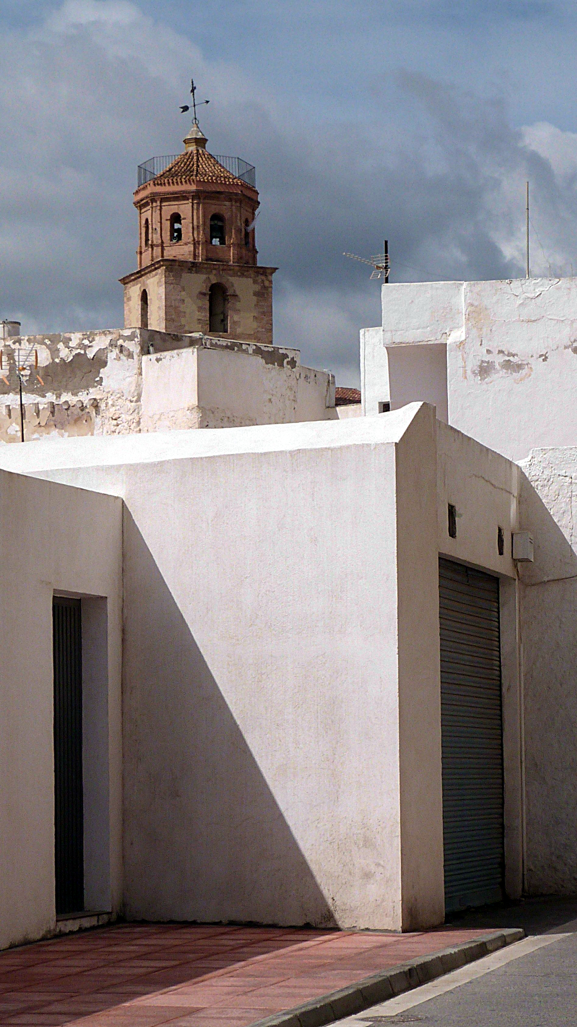 Alhama de Almería